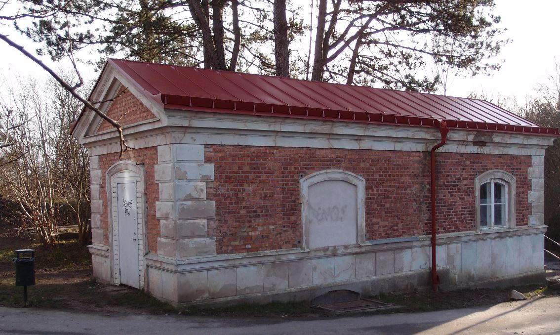 Pumphus byggt 1878-1879 för att förse vattentornet på Lunds hospital med vatten